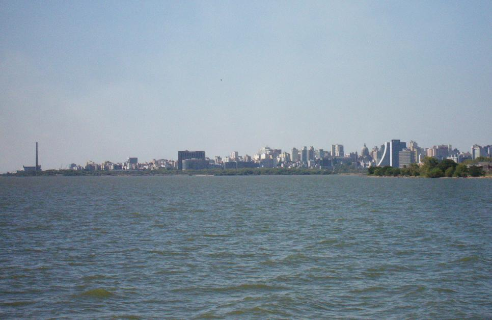 Porto Alegre vista a partir do Lago Guaíba. A Usina do Gasômetro pode ser vista à esquerda e o prédio do Centro Administrativo do Estado do Rio Grande do Sul à direita.